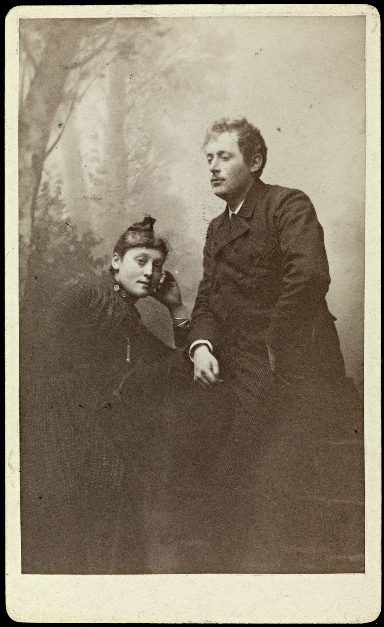 Tittel / Title: Portrett av Edvard Munch og søsteren, Inger Munch [usikker identifisering] Motiv / Motif: Visittkort. Det er usikkert om dette er Inger Munch. Er det noen som kan bekrefte/avkrefte identifiseringen? Dato / Date: ukjent / unknown Fotograf / Photographer: ukjent / unknown Eier / Owner Institution: Nasjonalbiblioteket / National Library of Norway Lenke / Link: Bildesignatur / Image Number: blds_05662